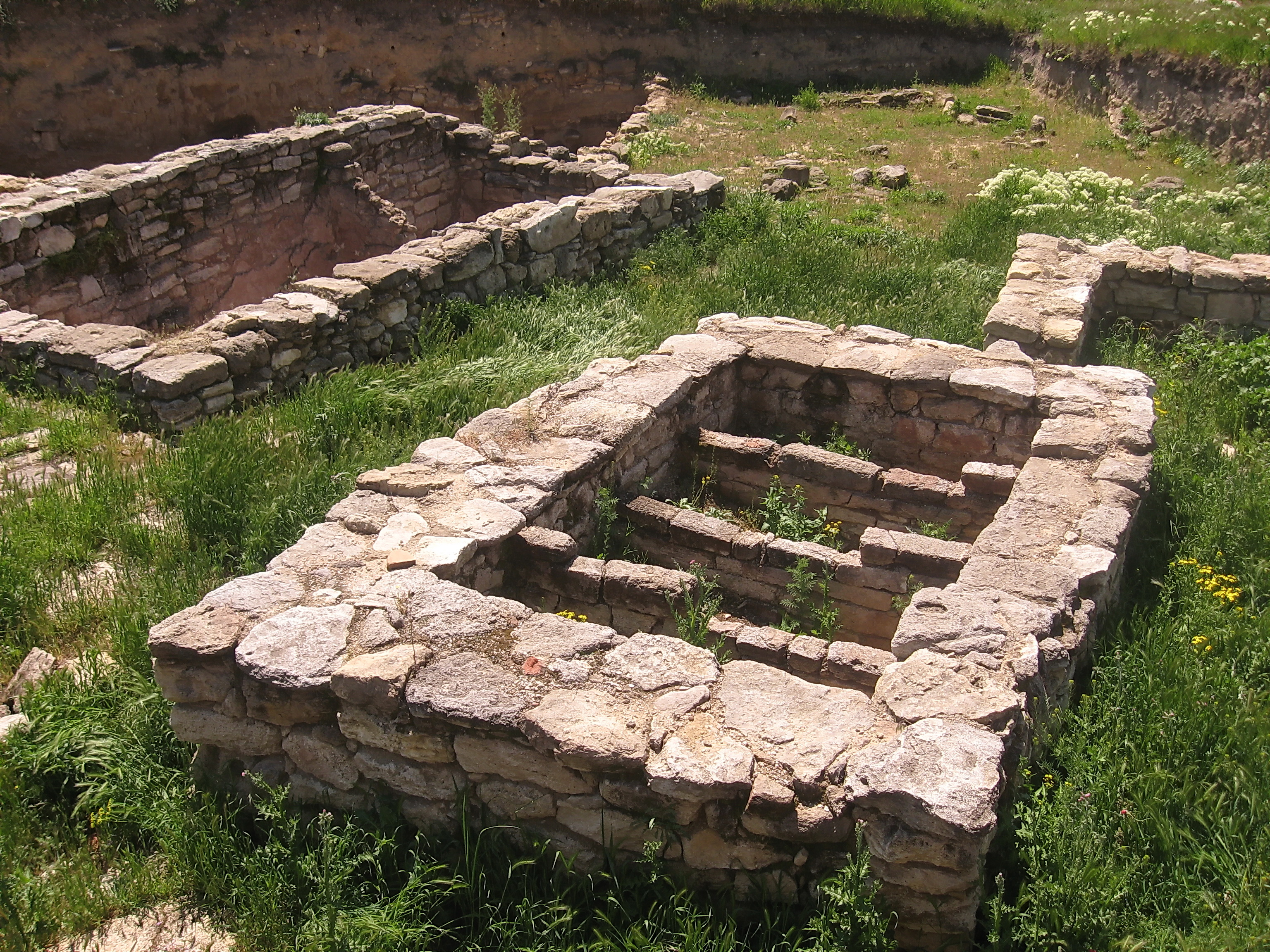 Рыбозасолочные ванны на древнегреческом городище Тиритака под Керчью